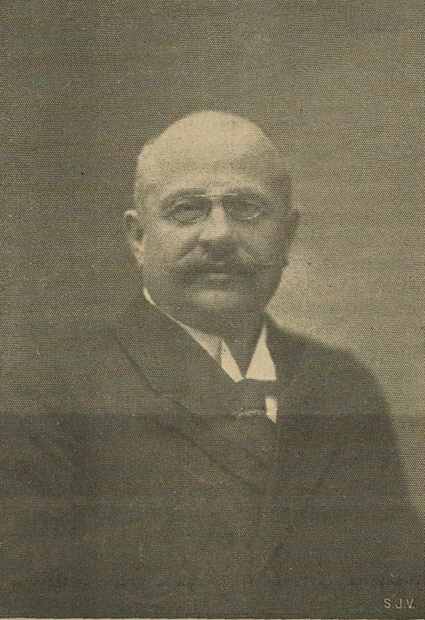 Porträtfoto des Klagenfurter Bürgermeisters Gustav von Metnitz